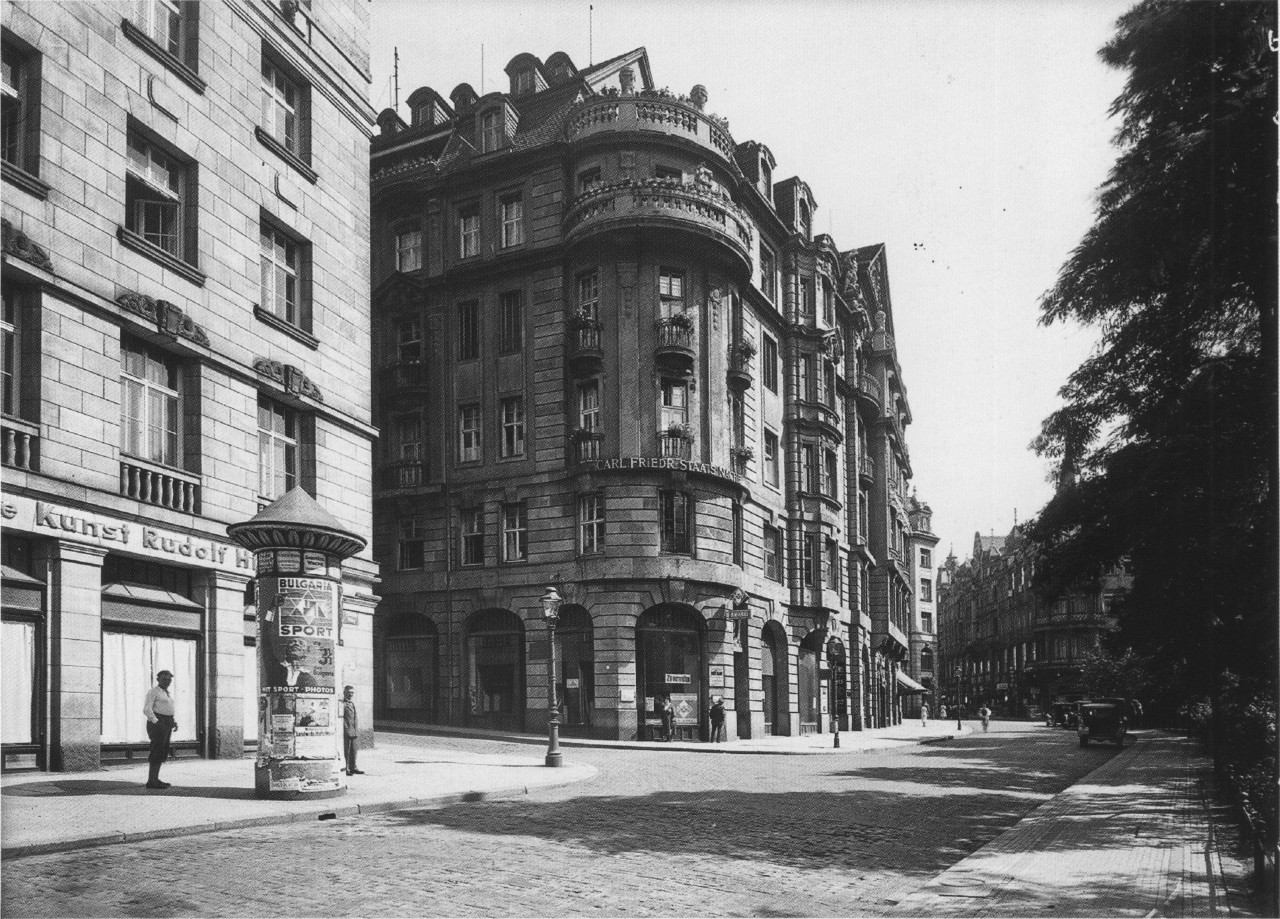 Wünschmanns Hof, Dittrichring 18-20. Erbaut 1908 von Georg Wünschmann.